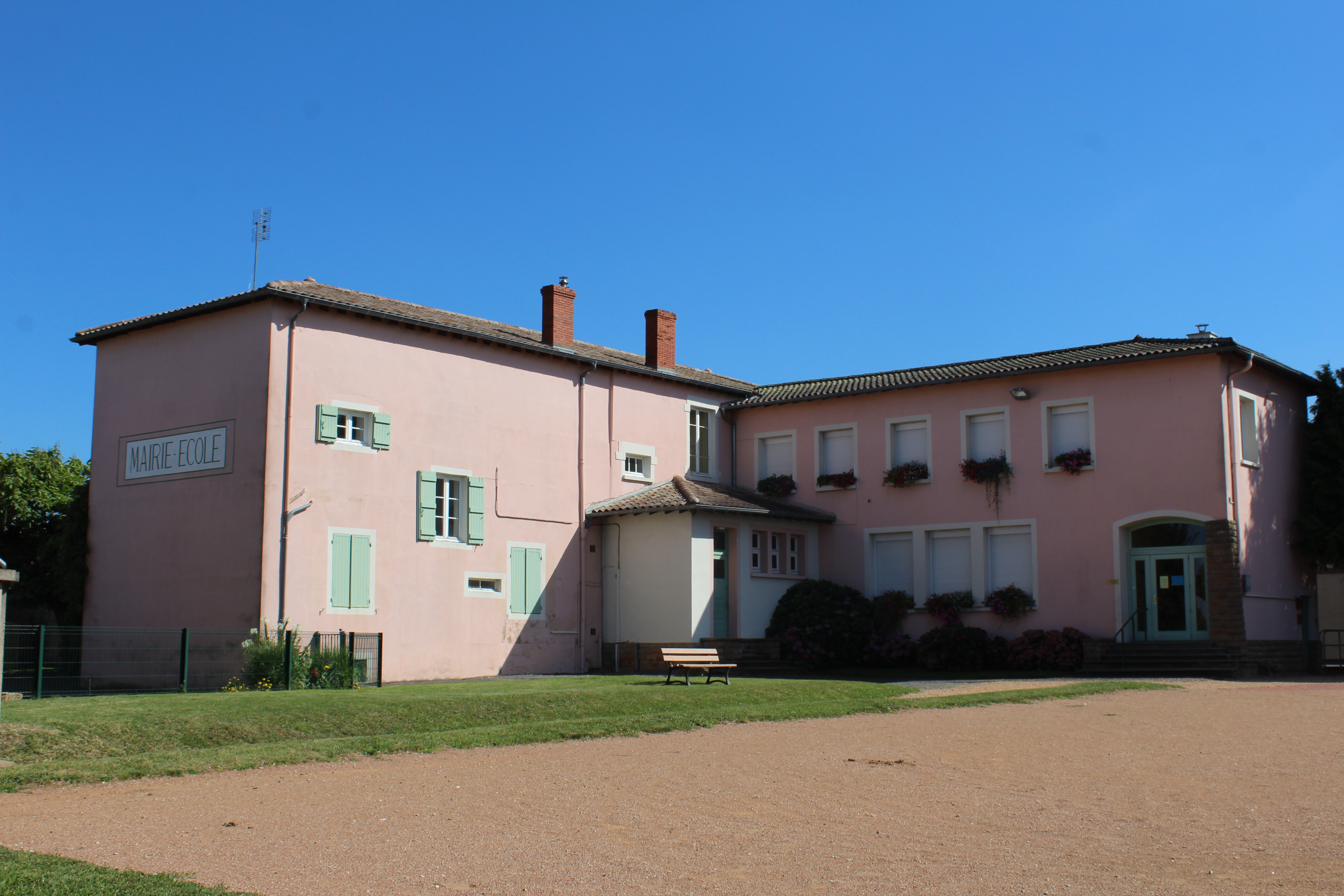 Mairie-école de Varennes-lès-Mâcon.